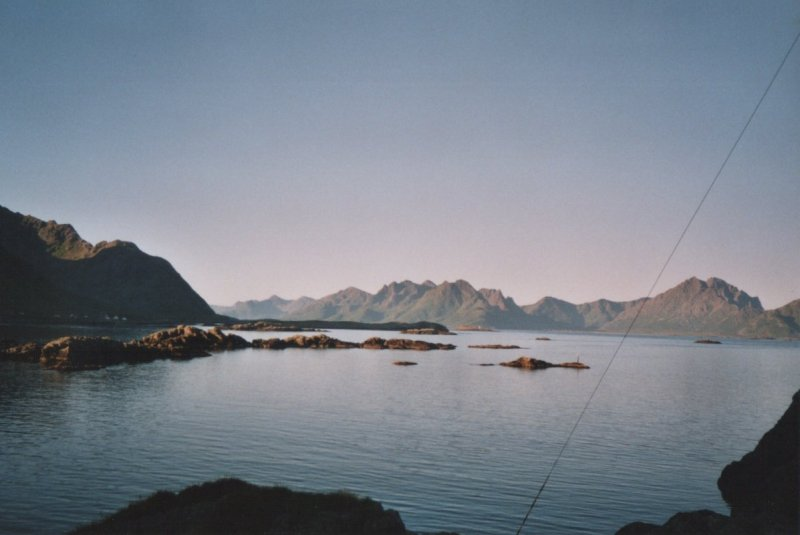 View from Nyksund to Skogsøya island, Vesterålen, Norway.